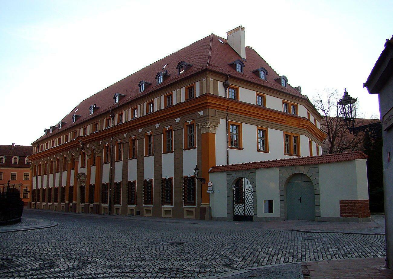 Orphantrophaeum (sierociniec)